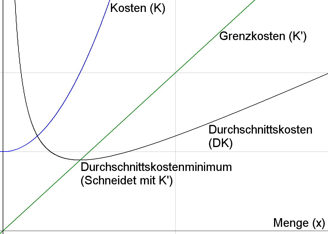 Kostenfunktion